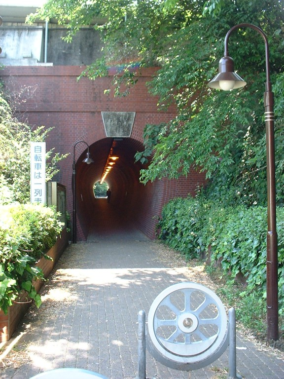 遠州鉄道奥山線 亀山トンネル跡 元城駅～広沢駅間 現在は遊歩道